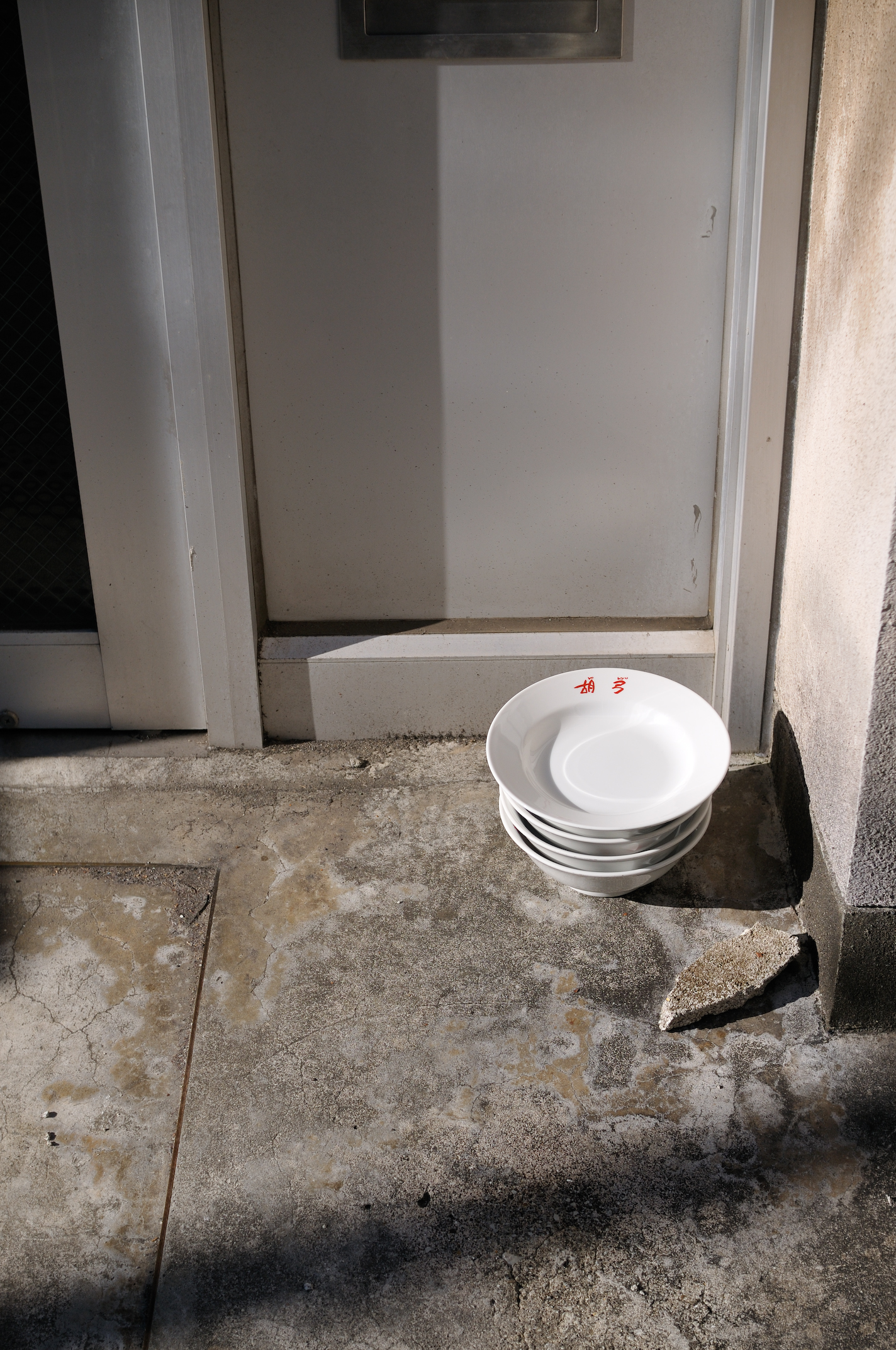 食べてから、回収前に食器を洗っておくパターン